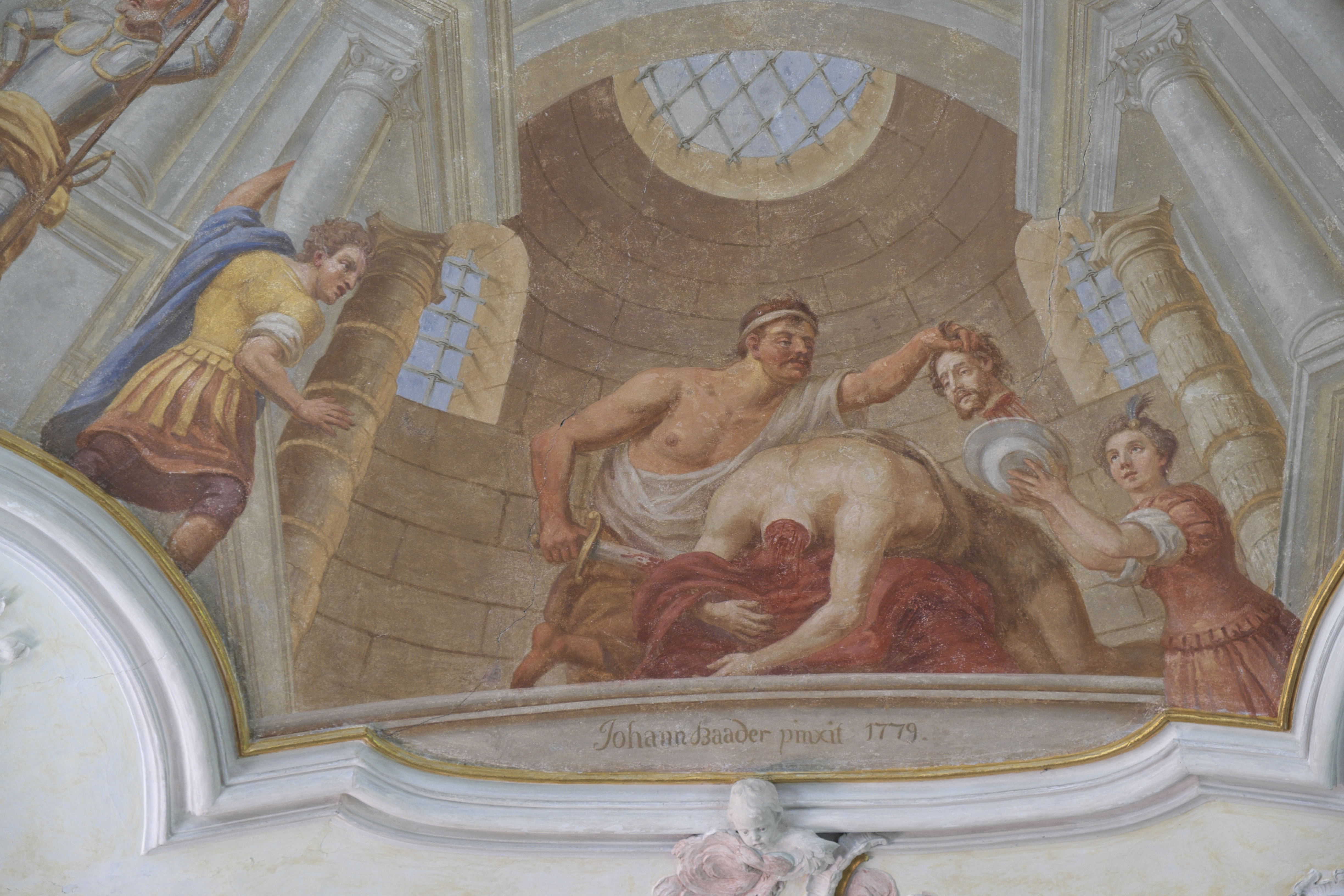 Katholische Pfarrkirche St. Johannes der Täufer in Rott im Landkreis Landsberg am Lech (Bayern/Deutschland), Stuck vermutlich von Johann Michael Merk, Fresken im Langhaus von Johann Baptist Baader, von 1779; Darstellung: Enthauptung des Johannes (Ausschnitt), Signatur: Johann Baader Pinxit 1779 Johann Baptist Baader (1717–1780) Alternative namesLechhanslDescriptionGerman painterDate of birth/death23 January 171725 August 1780Location of birth/deathLechmühlen, FuchstalSchlehdorfAuthority control VIAF: 74643756 GND: 118505386 RKD: 3142